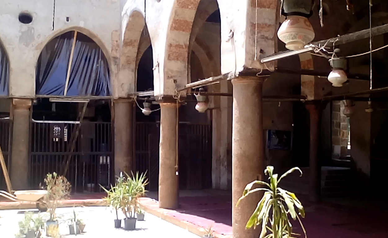 صحن مسجد العمراوي من الداخل بالمنيا